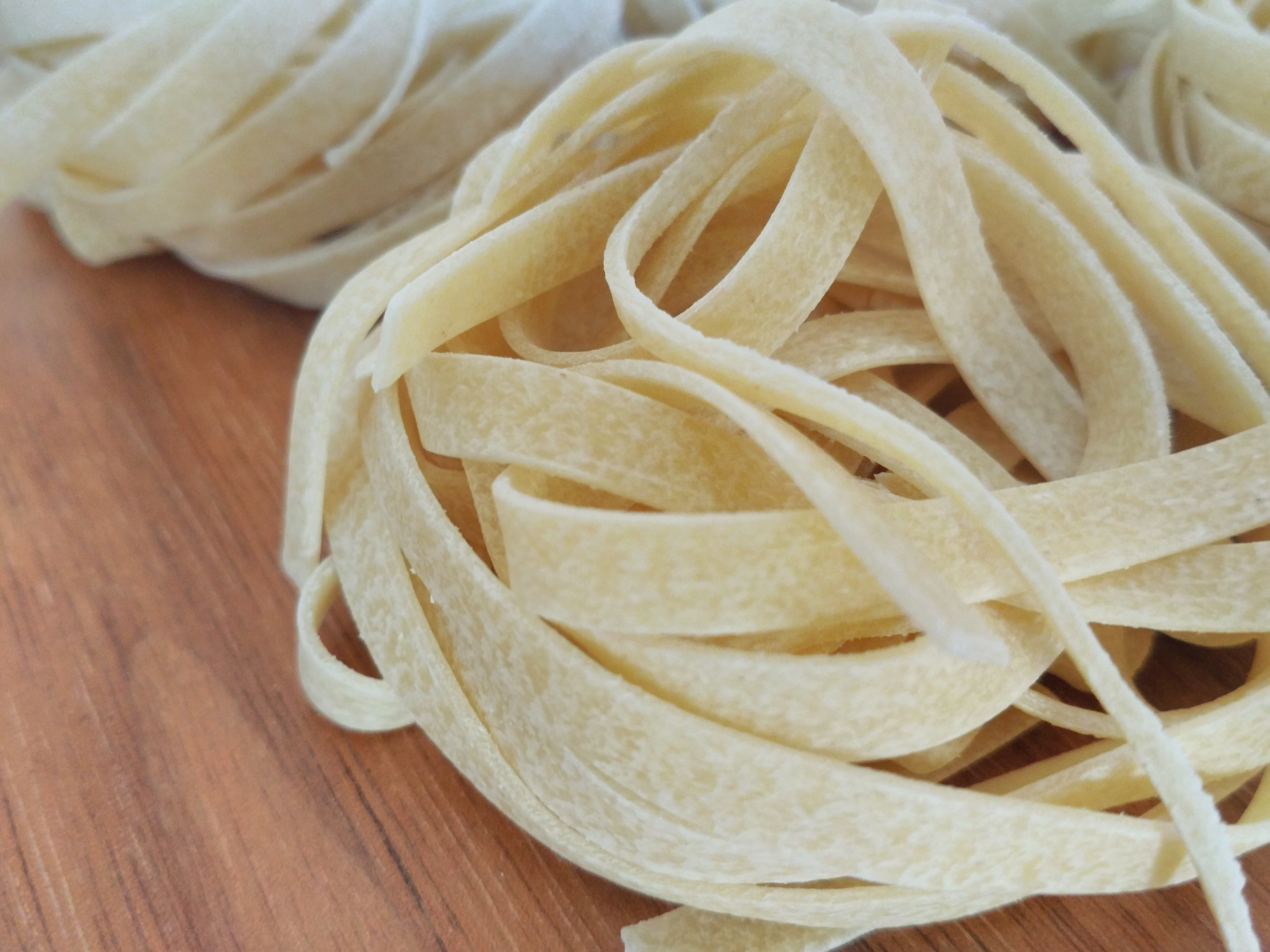 tagliatelle